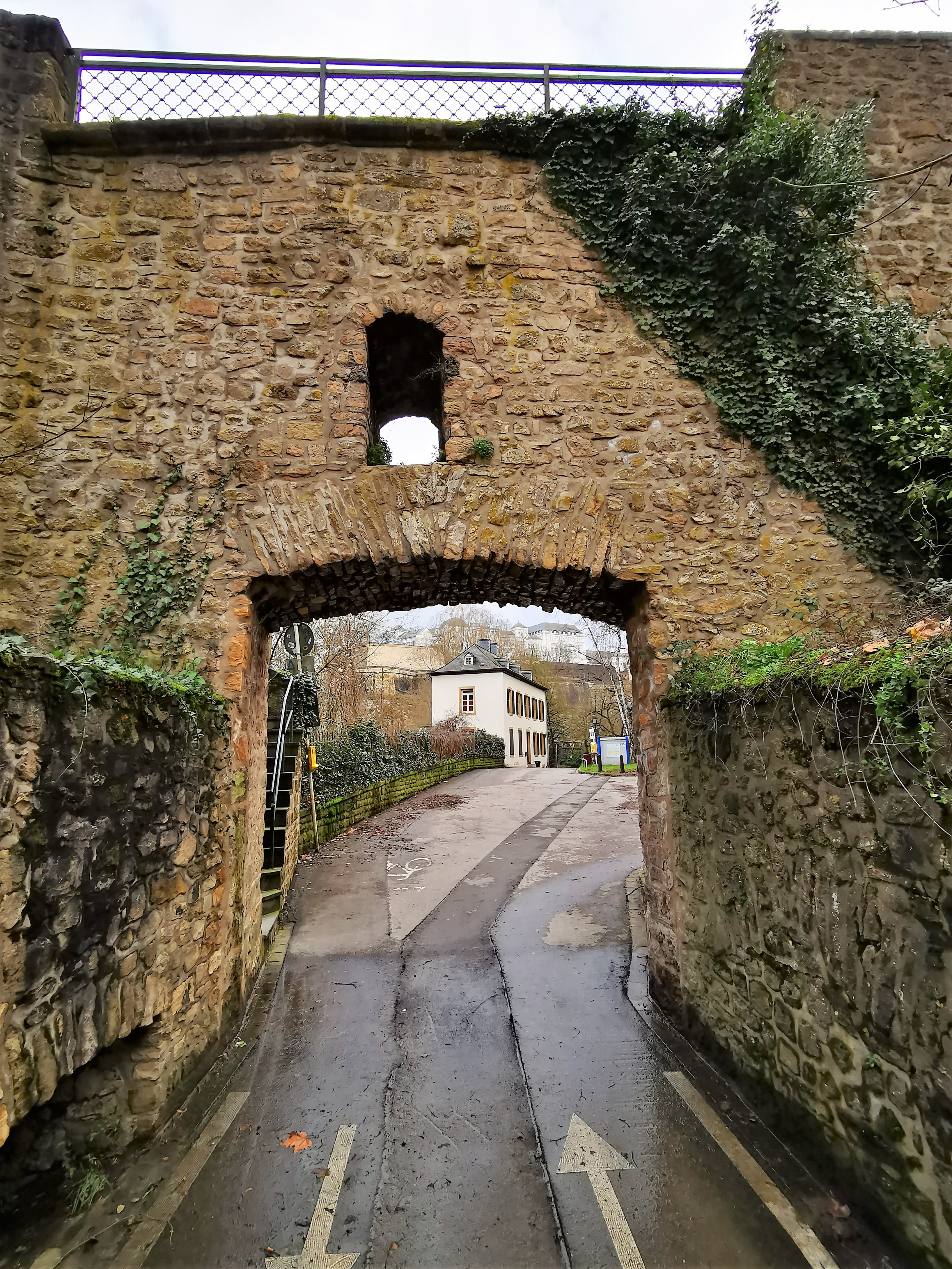 Luxembourg-Grund, la porte dite Biisserpaart. Vue extérieure (côté est).